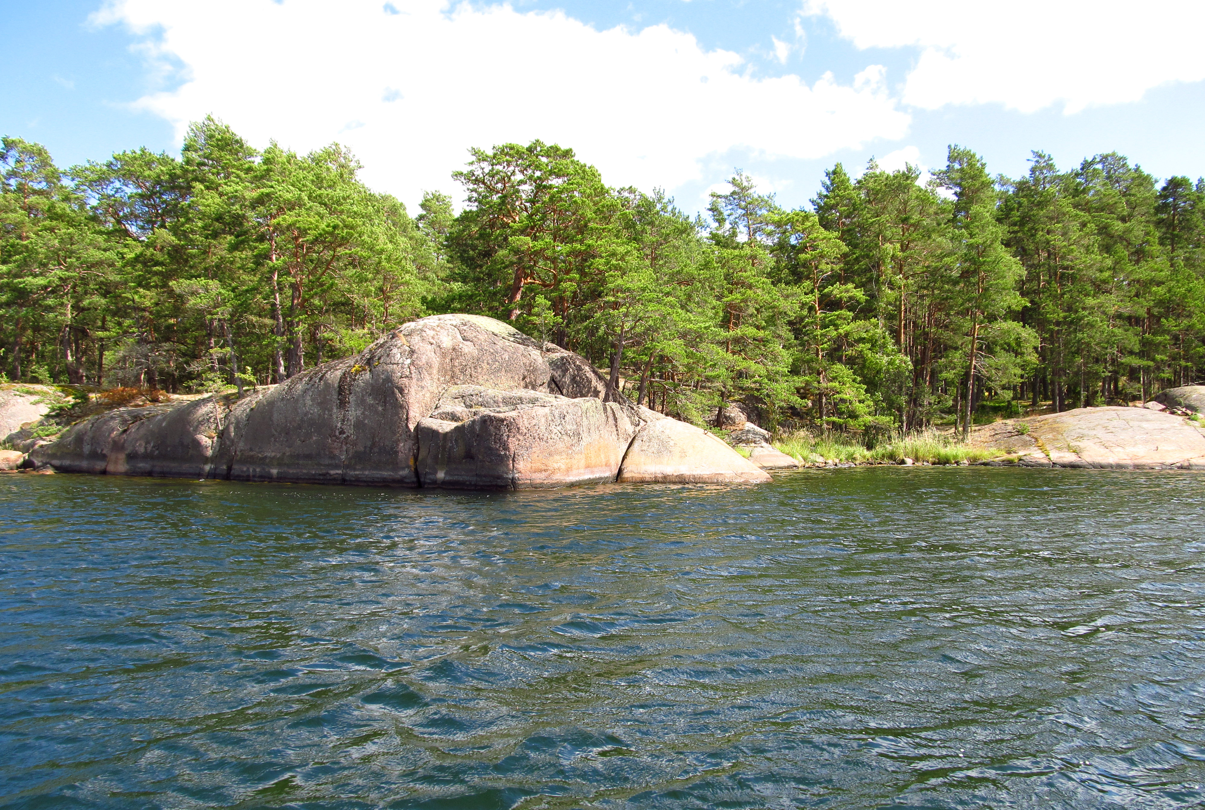 Vy mot Storö. Ön utgör en del av ett naturreservat i Oskarshamns kommun.